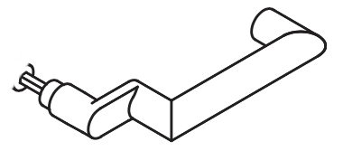 Konstruktionsprinzip